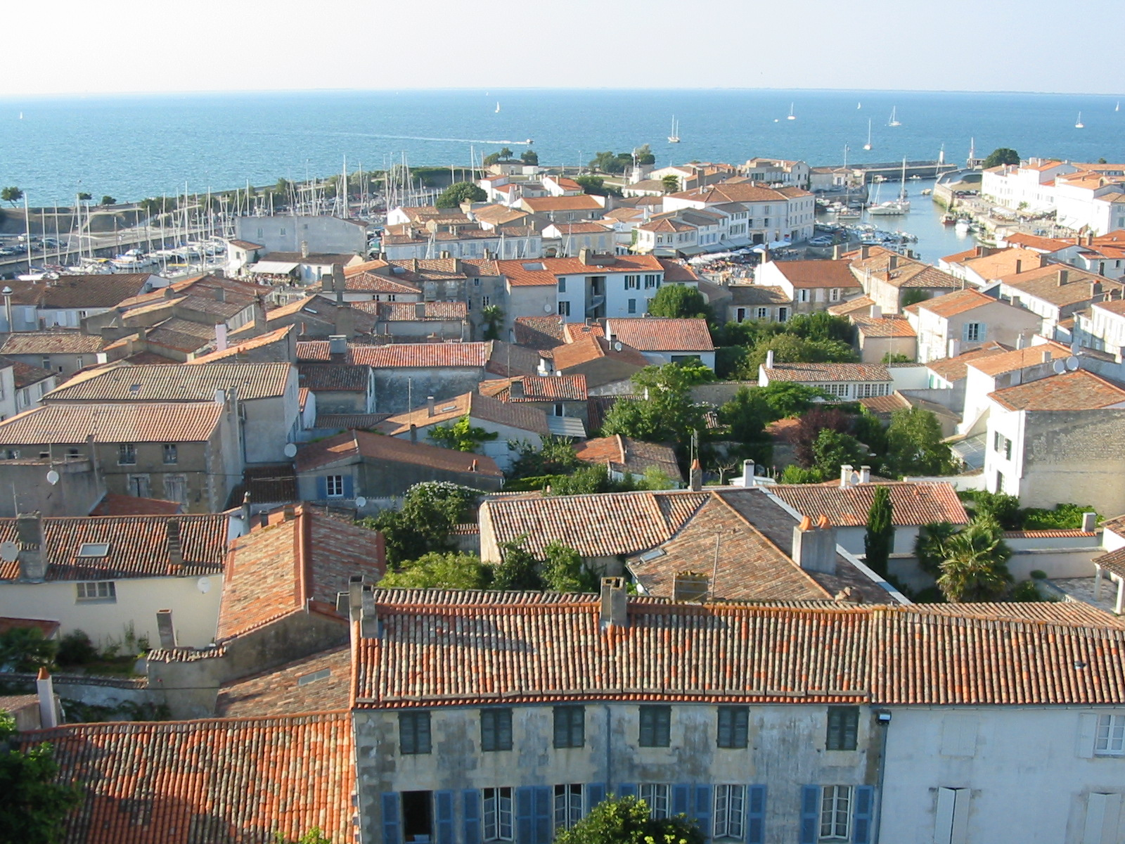 Saint-Martin de Ré, France